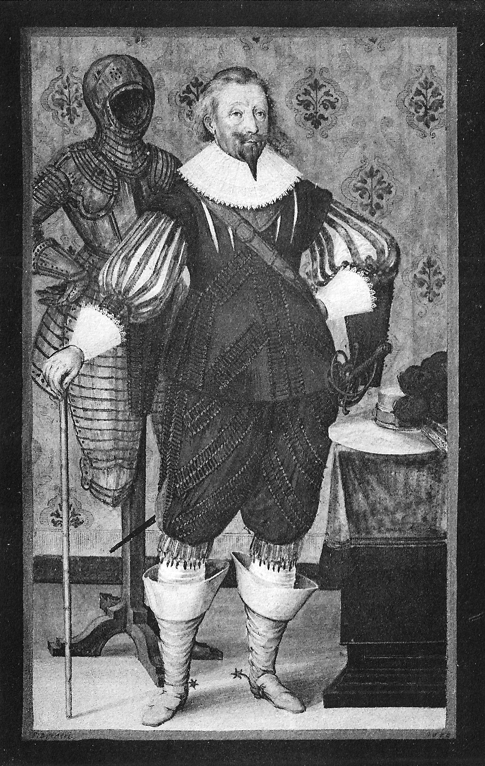 Friedrich Graf von Solms-Rödelheim (* 30.11.1574; † 5.9.1635) (Miniatur auf Pergament)